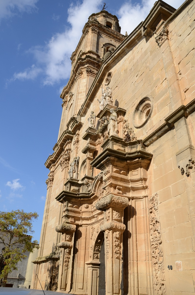 Església parroquial de Sant Llorenç (Vilalba dels Arcs)